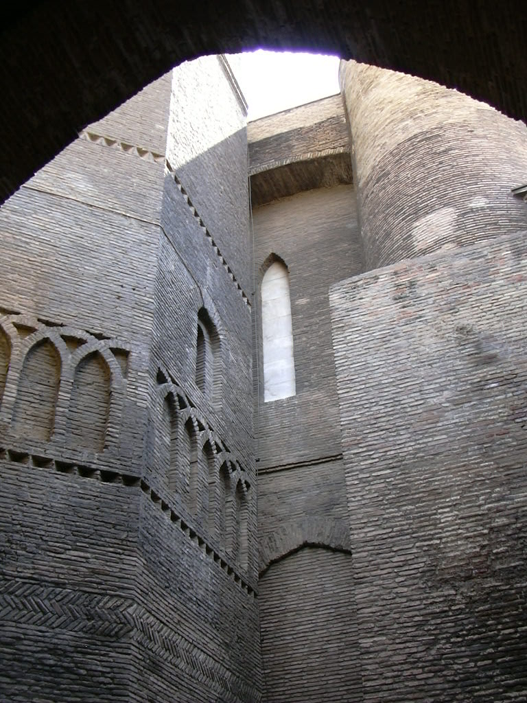 Zaragoza - San Pablo - Torre desde el interior